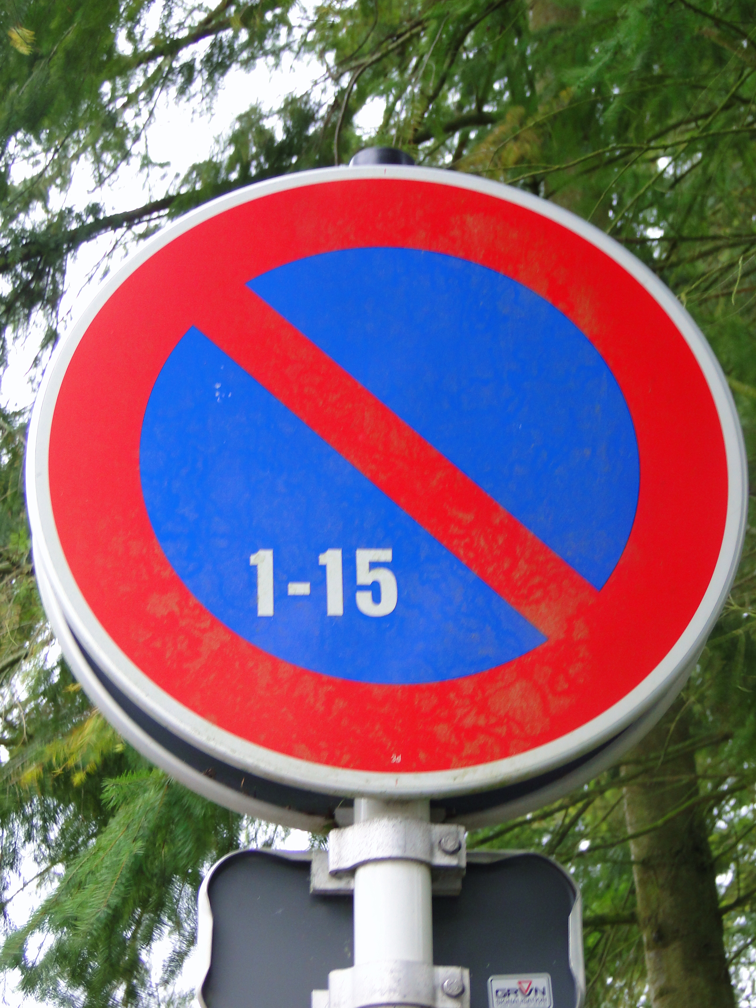 Verkéiersschëld C,20 "Stationnement alterné" (1-15) aus dem lëtzebuerger Code de la Route